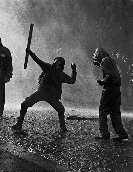 Jaroslav Kučera: Anarchisti, Praha, Lumírova ulice, 2000, vítěz Czech Press Photo 2000, Anarchisté protestují proti měnovému fondu. Někdy se uvádí také název Kameny a násilím proti globalizaci